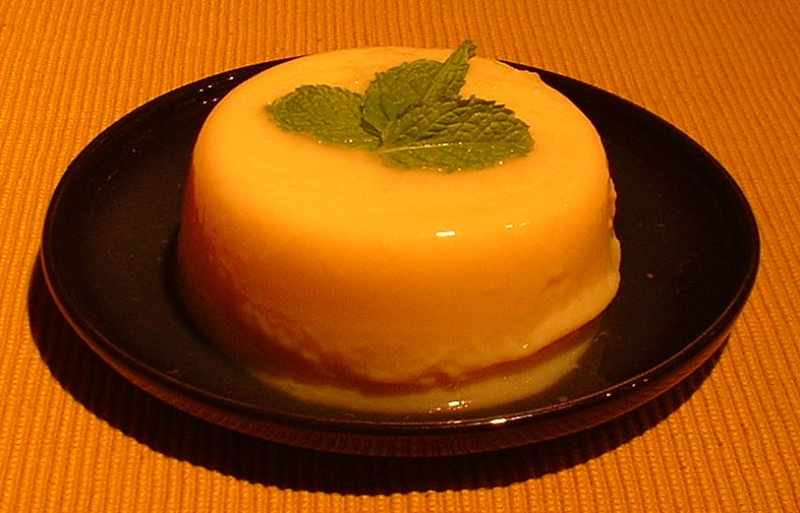 Mango pureren. 200 ml gecondenseerde melk en 100 gram suiker erdoor roeren. Gelatine oplossen in koud water, uitknijpen en door 300 ml kokend water roeren. Door de mangopuree roeren. In puddingvormpjes gieten. Opstijven in ijskast.Serveren met limoensap (onmisbaar! Zonder limoensap is het muffe, zware pudding) en wat munt.Ching's Mangopudding